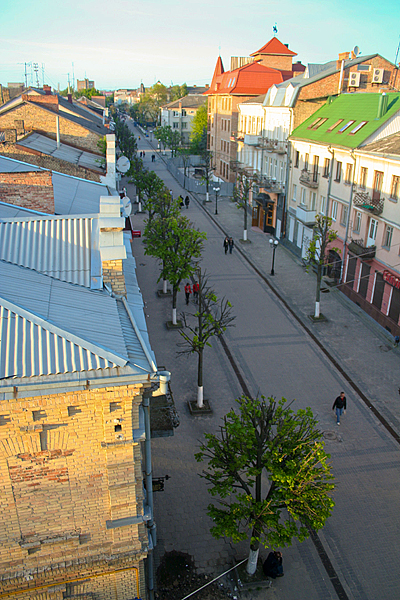 lesi ukrainky street